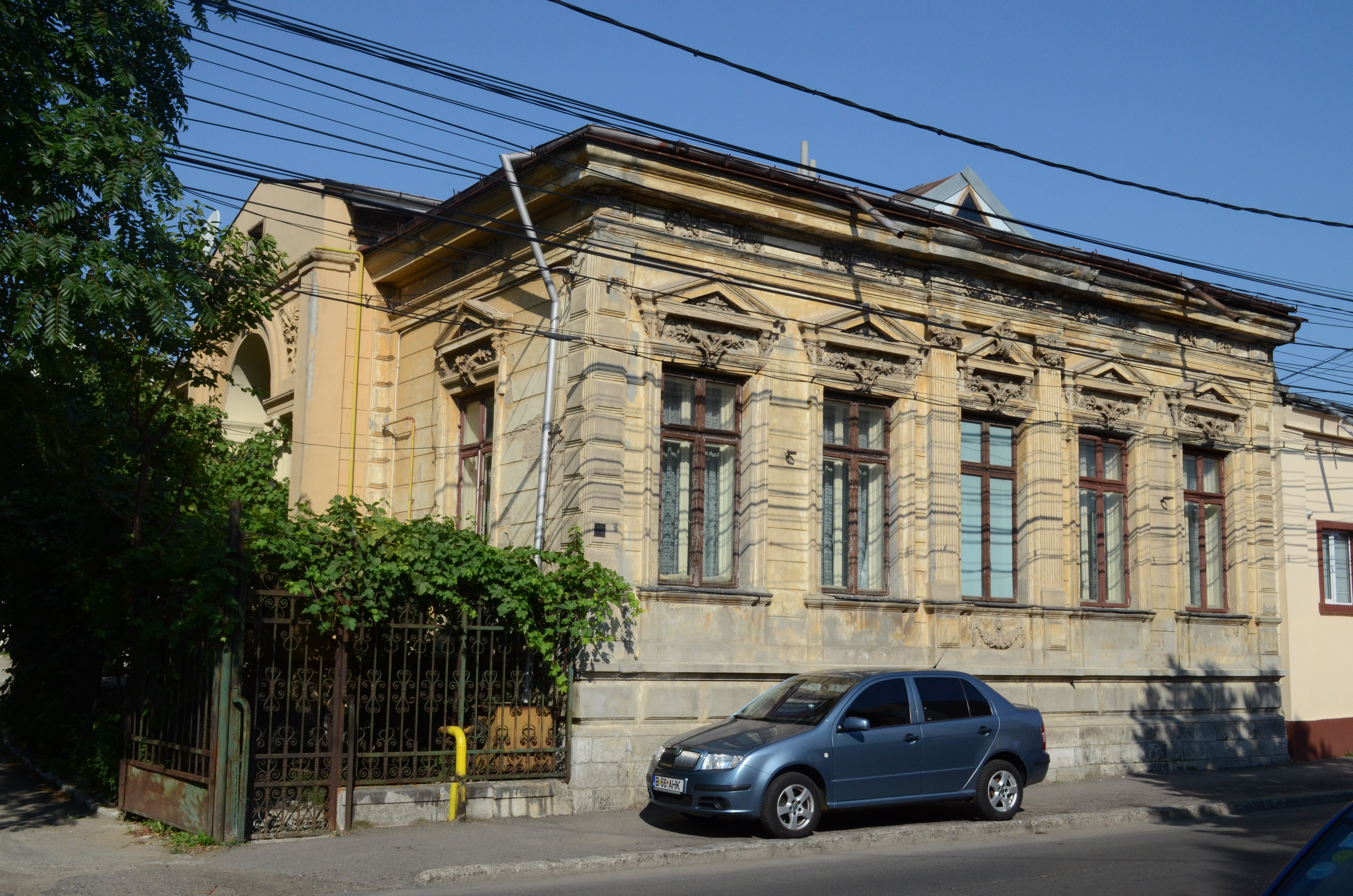 Casa Tiseanu, Str. Romană nr. 43, Ploiești